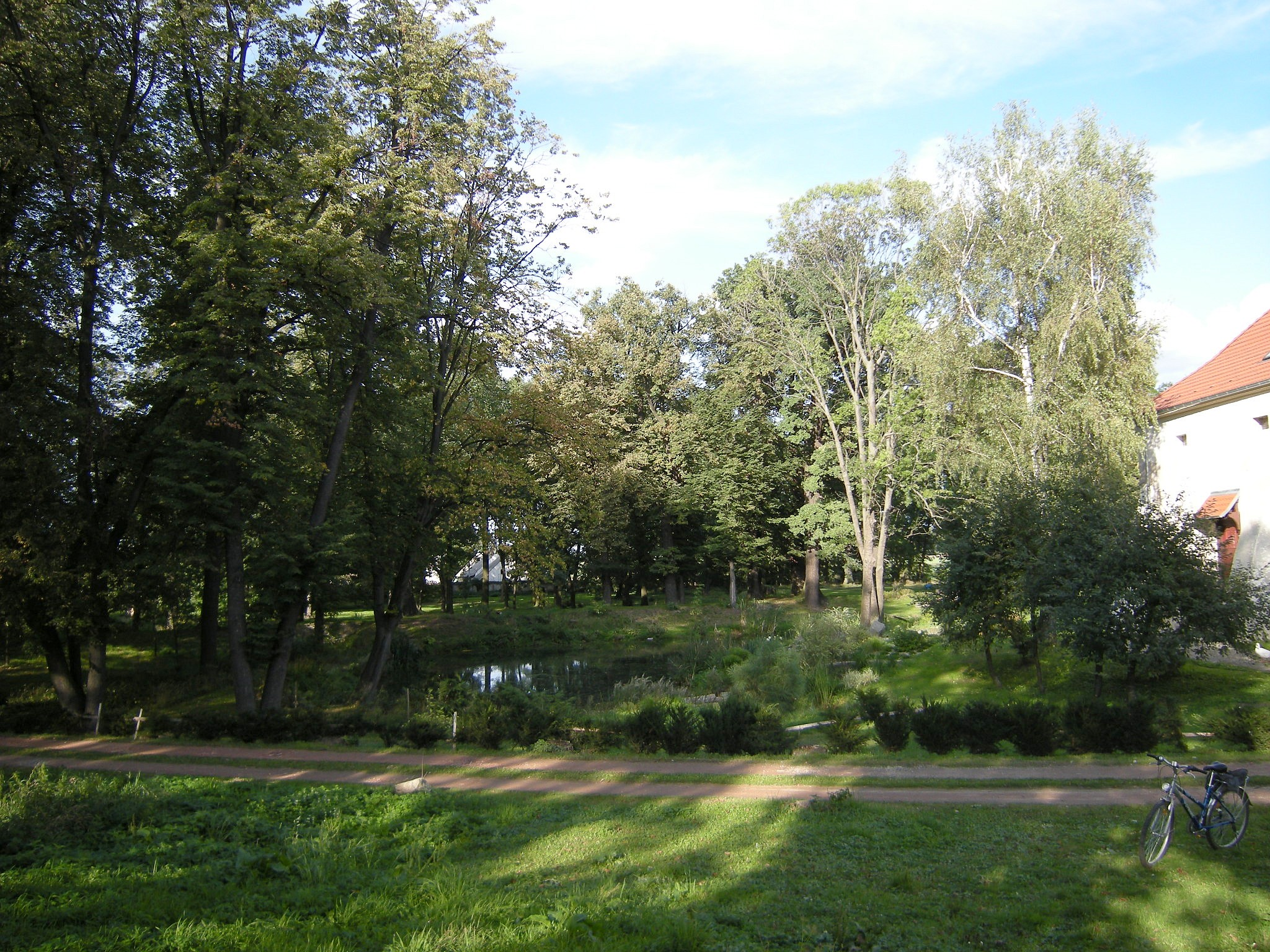 Fragment parku w zespole pałacowym Piotrowice Nyskie, Otmuchów 12.1984.